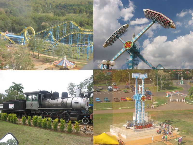 Area del parque de diversiones Mariposa del parque Lenin